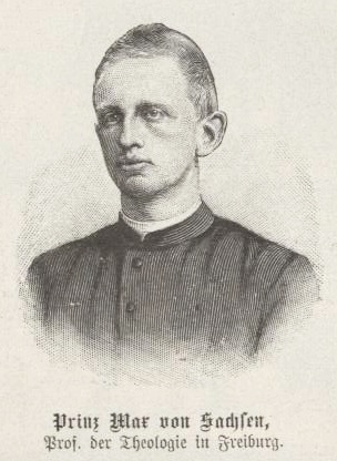 Prinz Max von Sachsen, katholischer Priester und Gelehrter